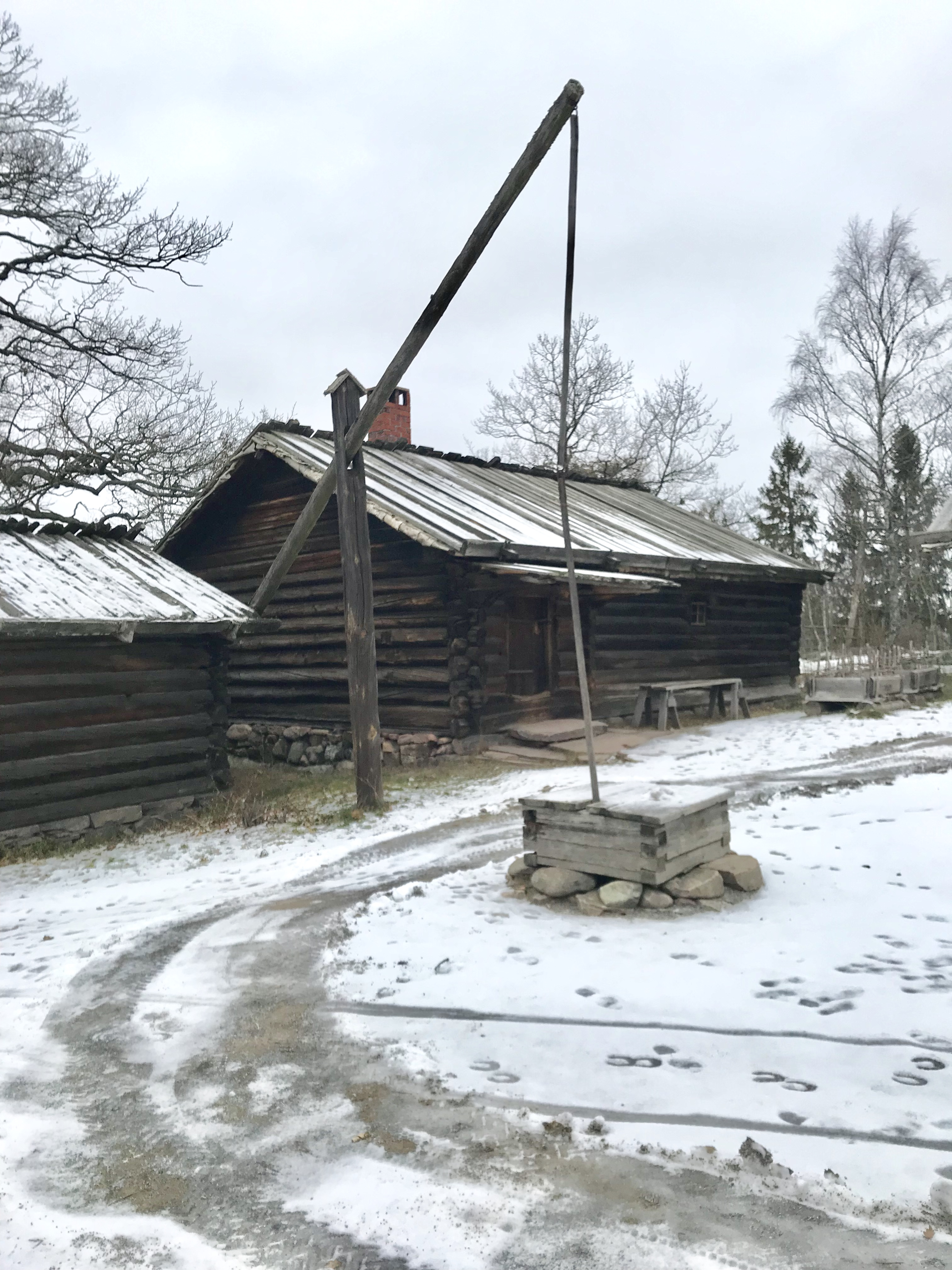 Skansen 2019